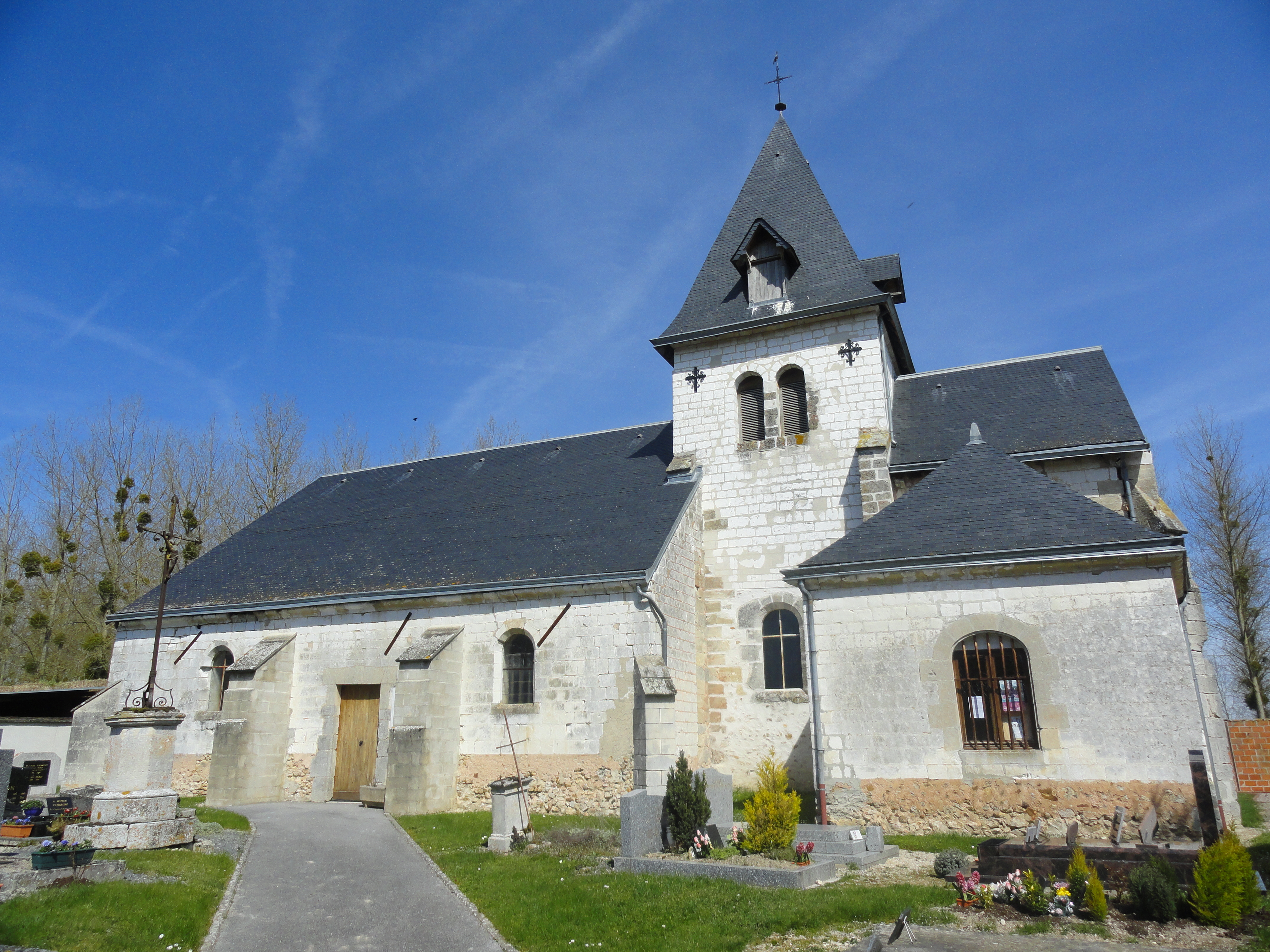 L'église Saint-Basle de Cherville et son cimetière.